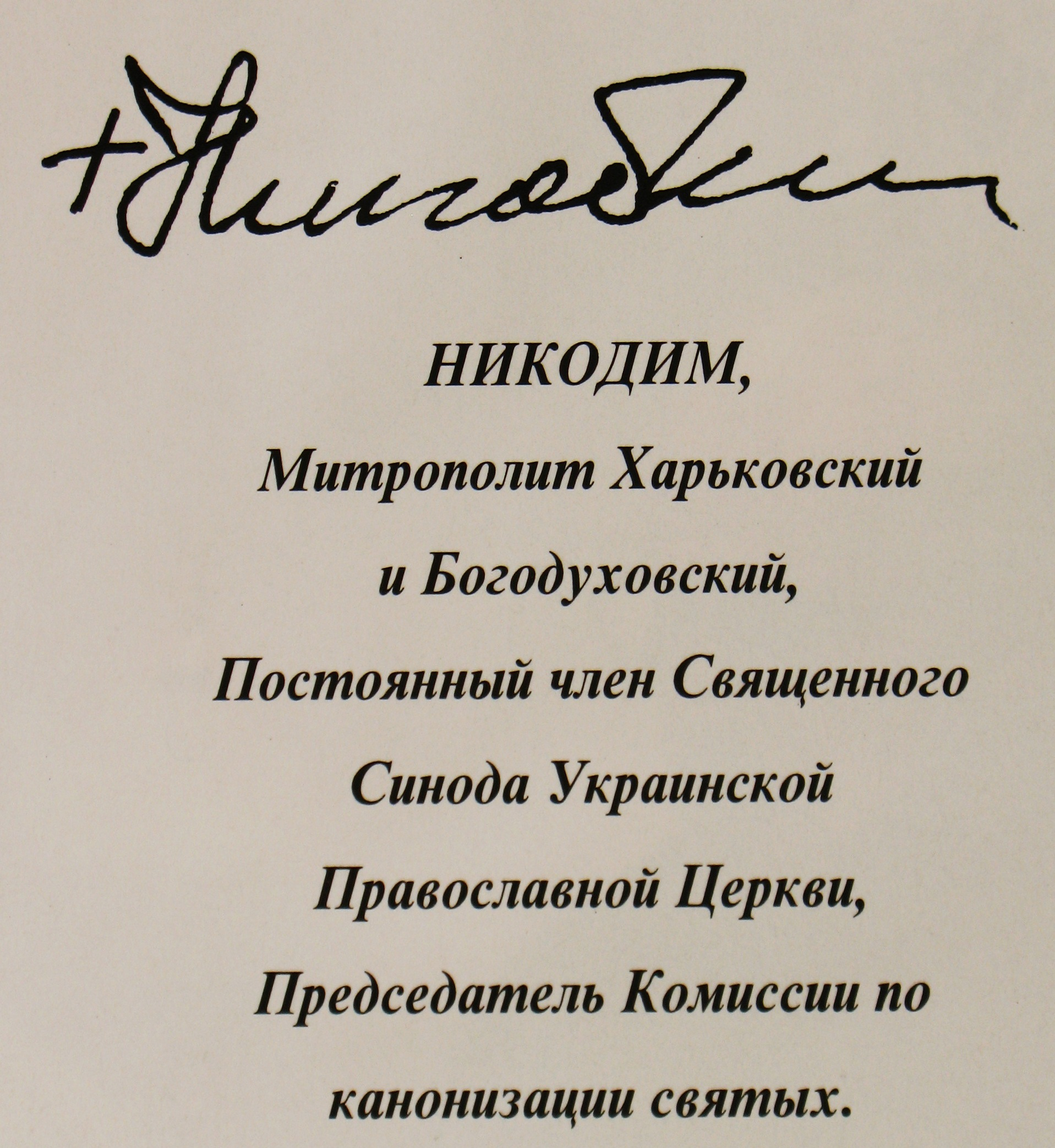 Подпись и должность митрополита Никодима (Руснака). Конец 1999 года.